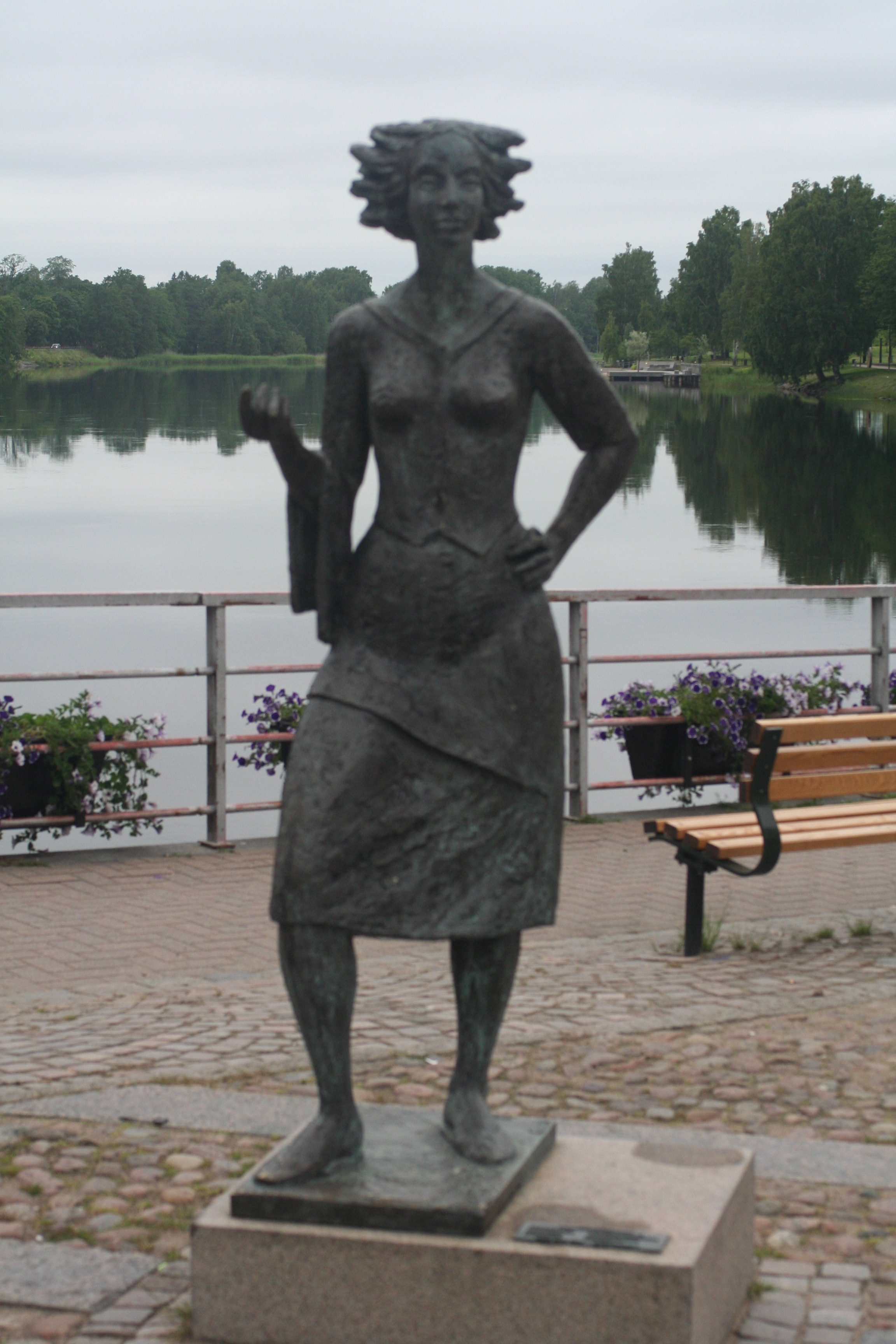 Statyn Sola i Kallsta i Karlstad, 2011